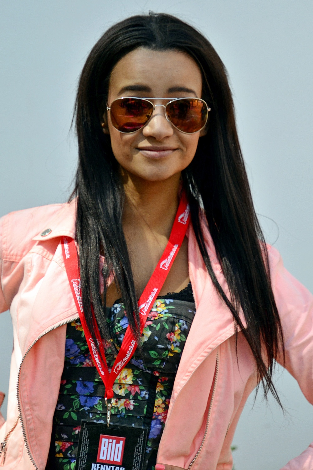 BILDRenntag 2013, Datum/Uhrzeit: 01.05.2013 12:54:29